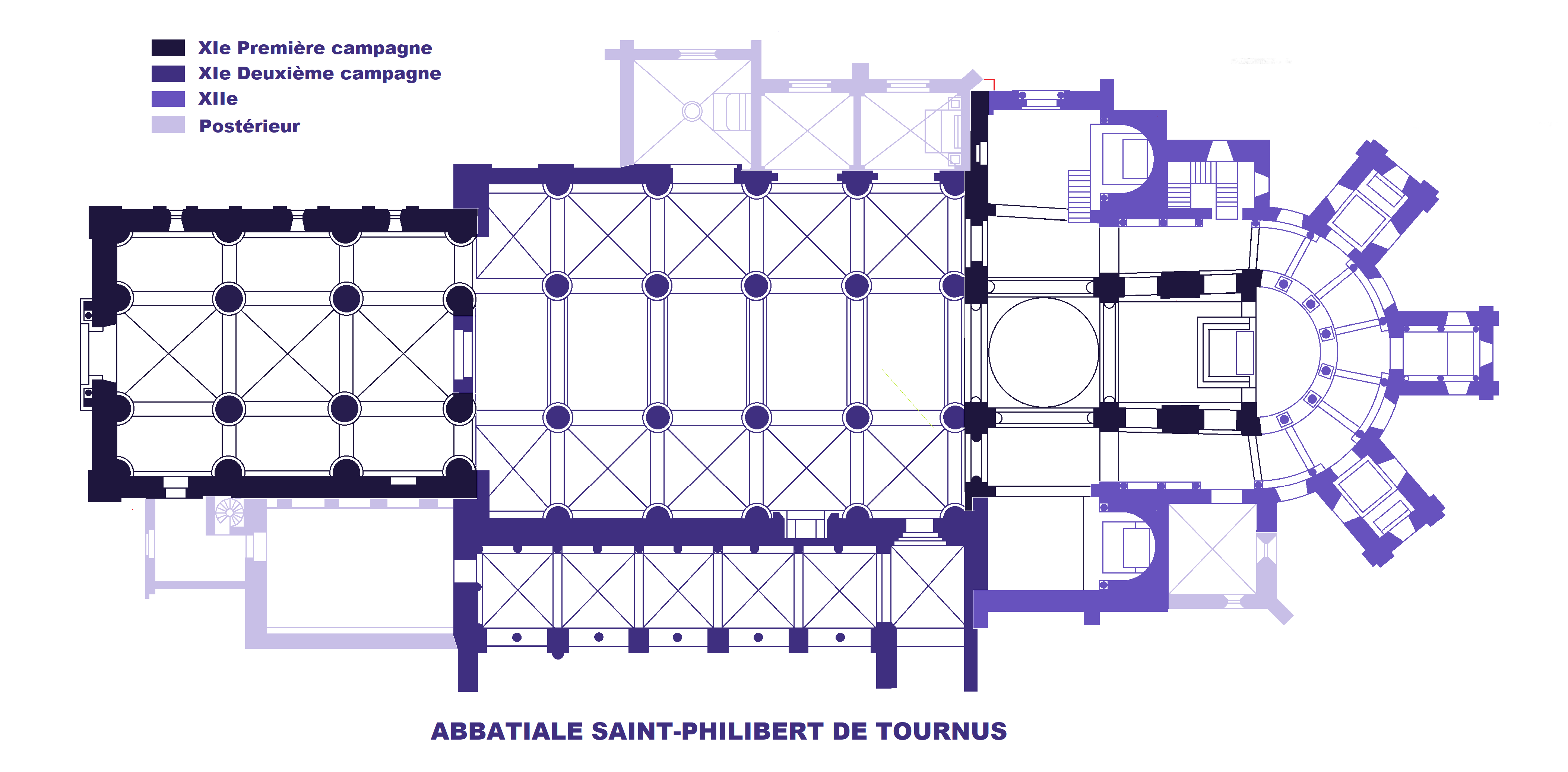 Abbatiala Saint-Philibert de Tournus, plan